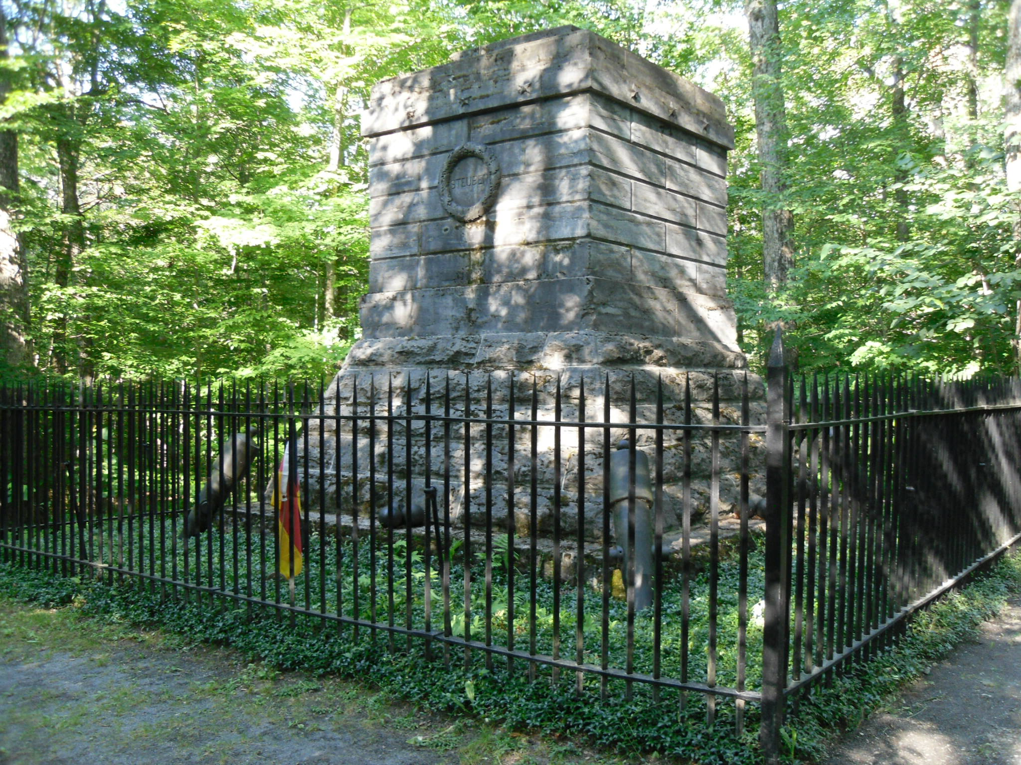 Steuben Memorial State Historic Site - Steuben, New York